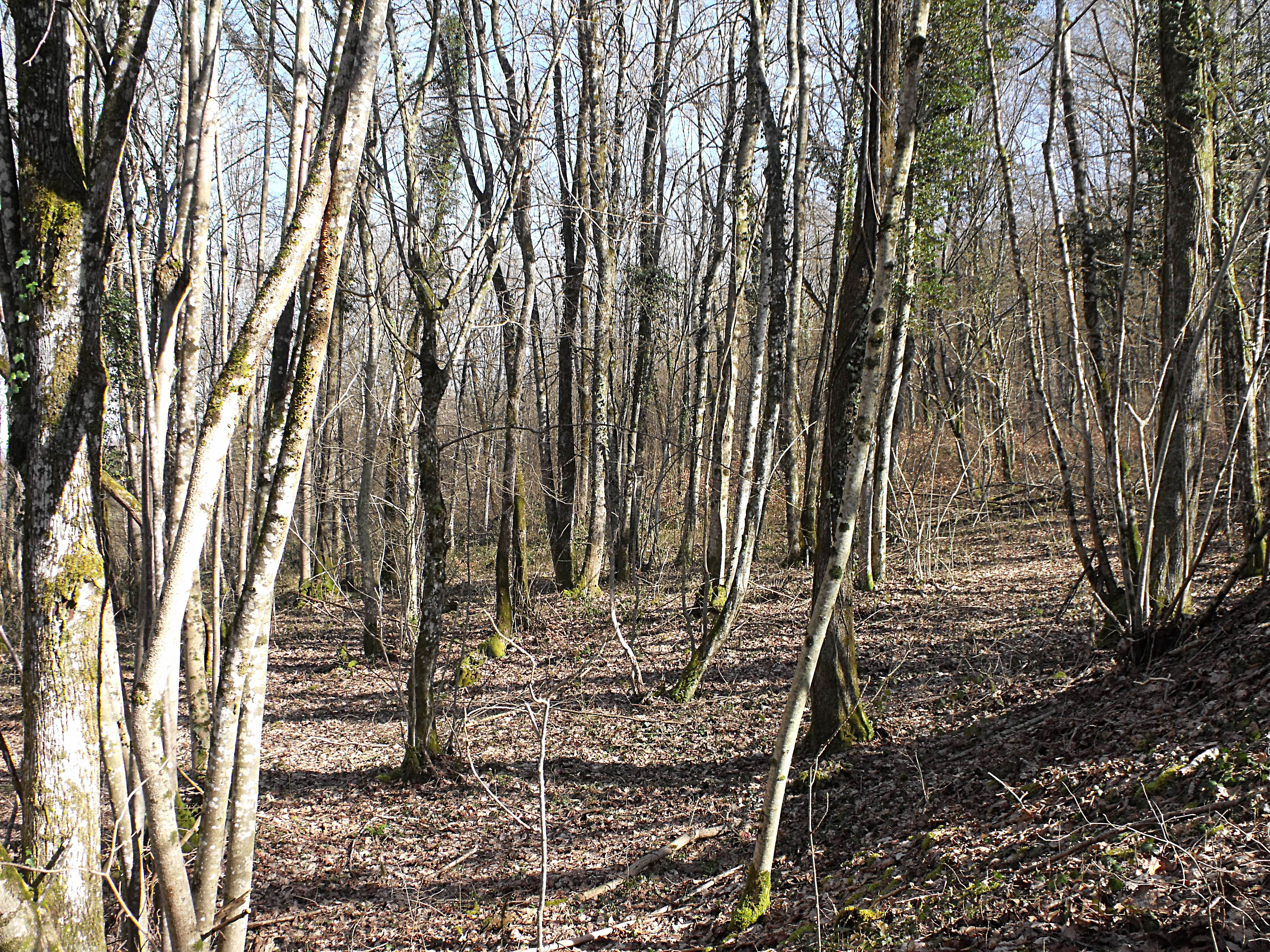 RNR du Crêt des roches, Doubs, France - Bois de la réserve